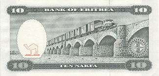 Обратная